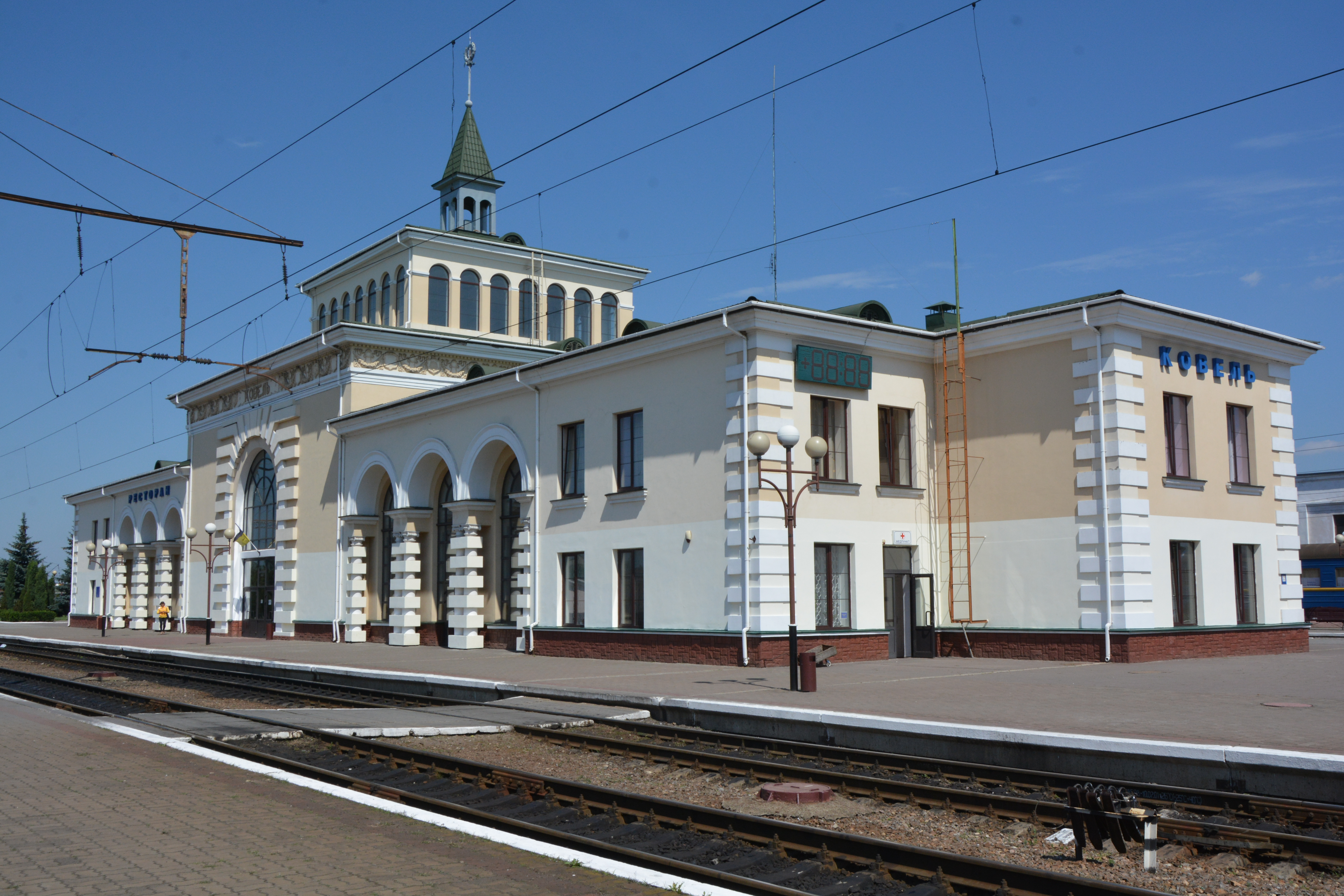 Залізничний вокзал (мур.), Ковель, вул. Привокзальна, 1